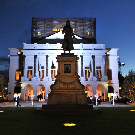 L'Opéra Royal de Wallonie en 2014